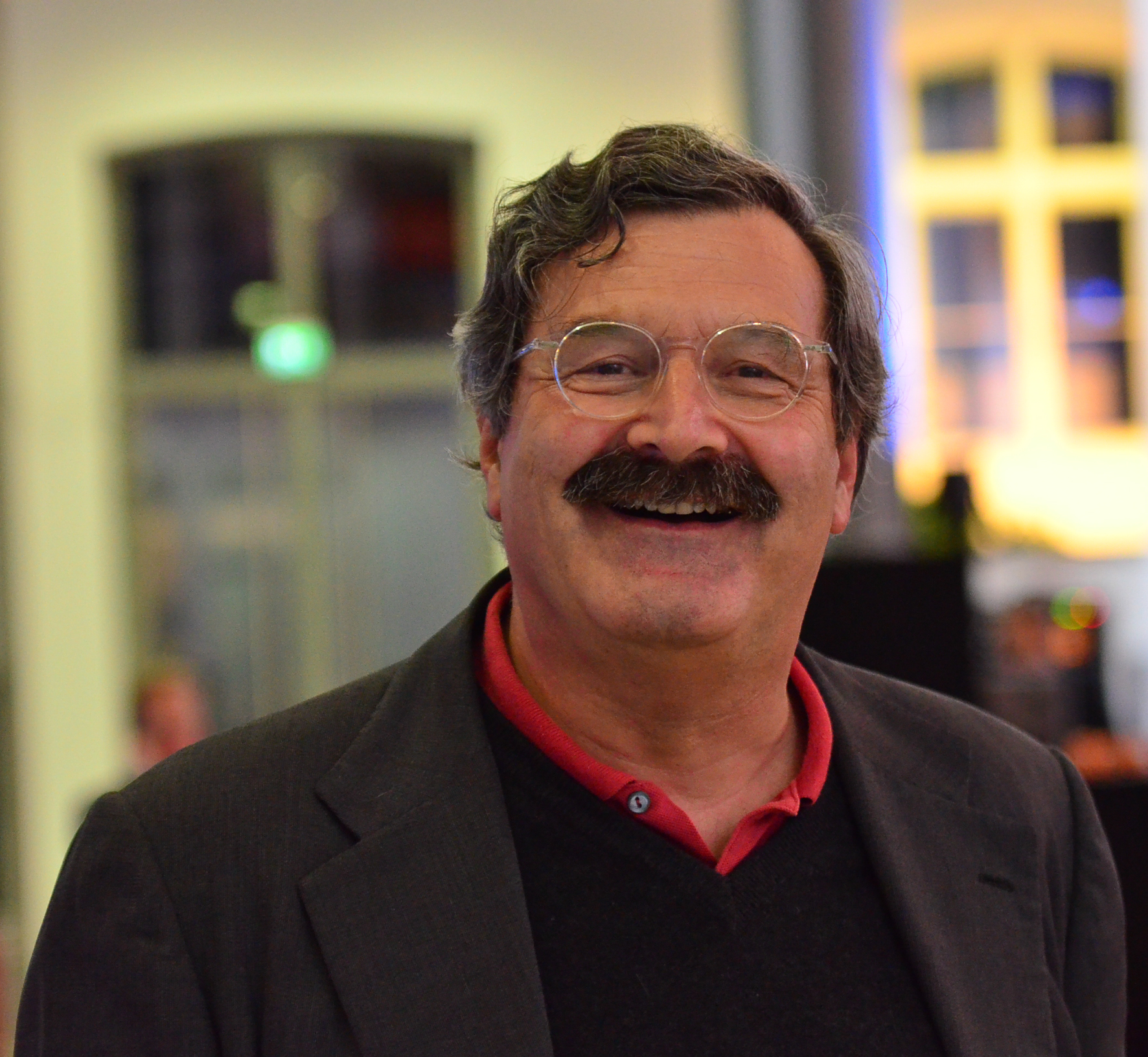 Nikolaus Brender im ZDF-Wahlstudio zur Bundestagswahl 2013; WP:Fotoprojekt zur Bundestagswahl 2013 in Berlin in den Parteizentralen und dem ZDF